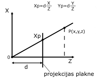 Šeit attēlota lineārās perspektīvas konstruēšana